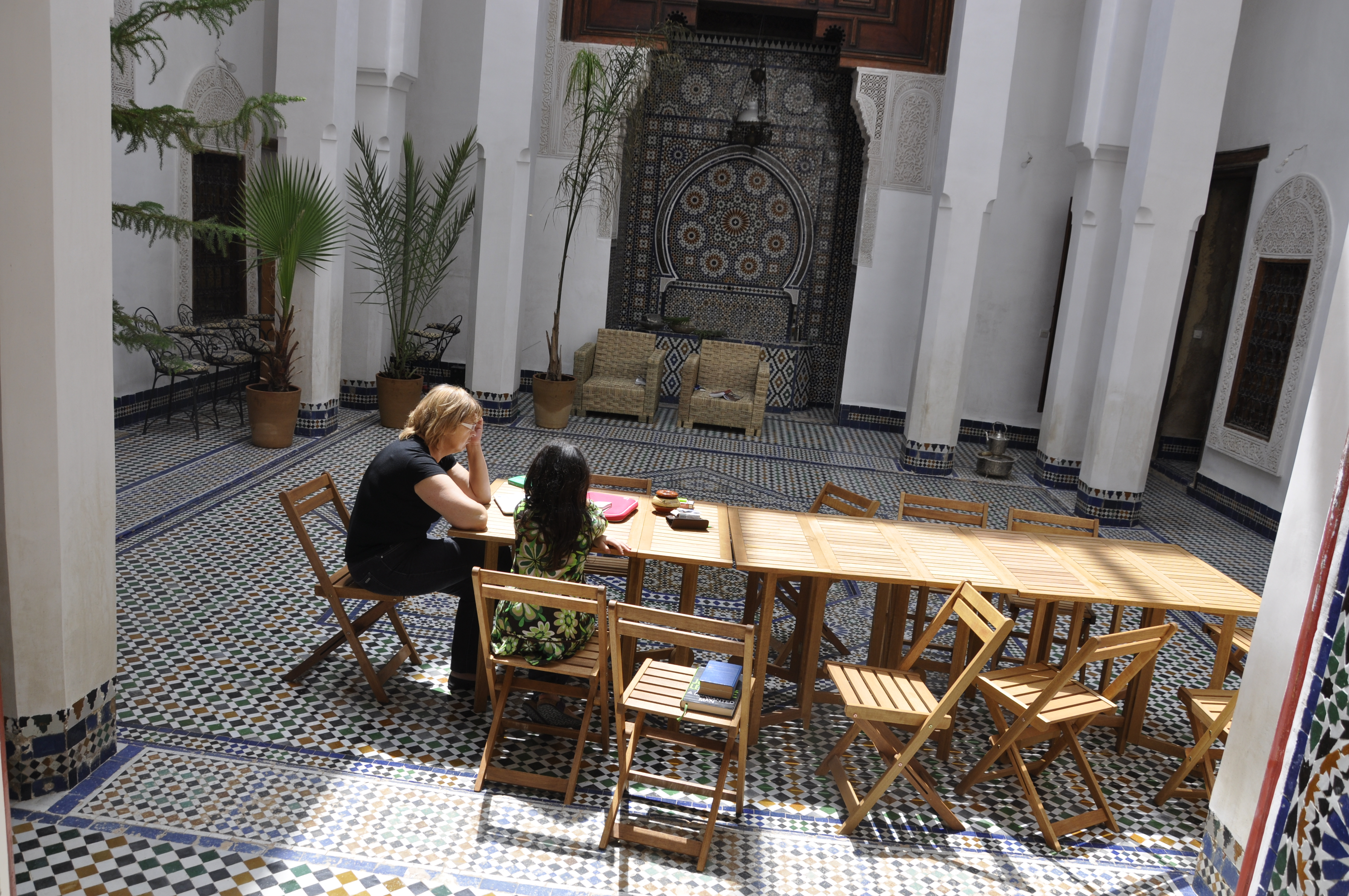 Un Riad à Fès